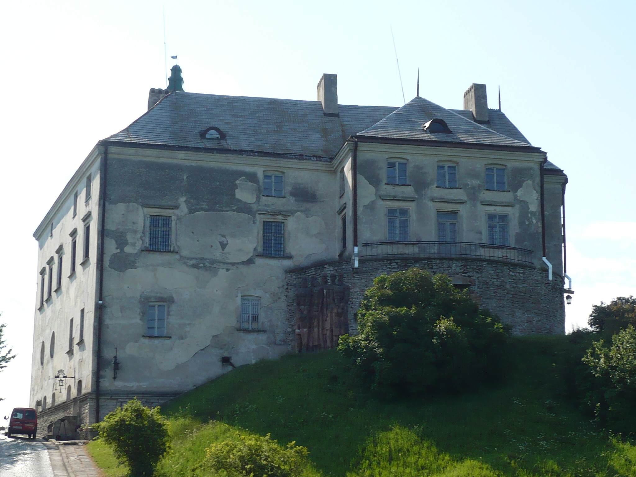 Olesko, zamek